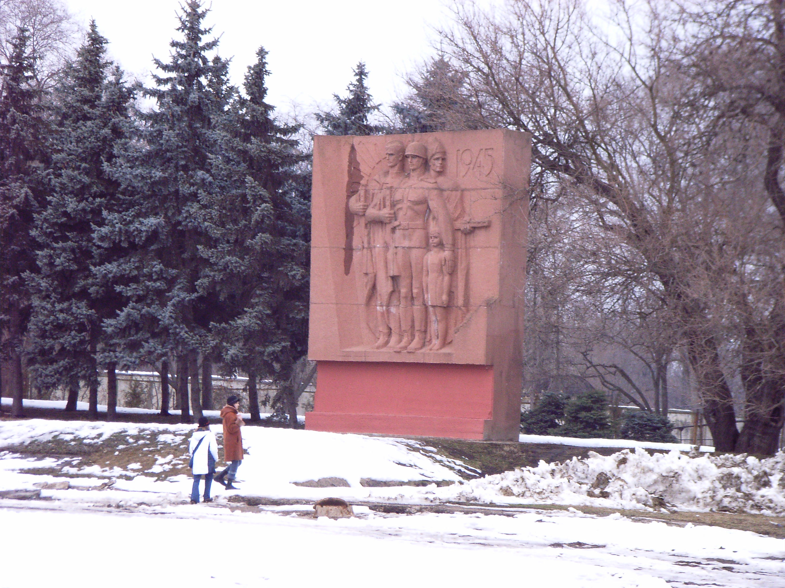 RIMG0096